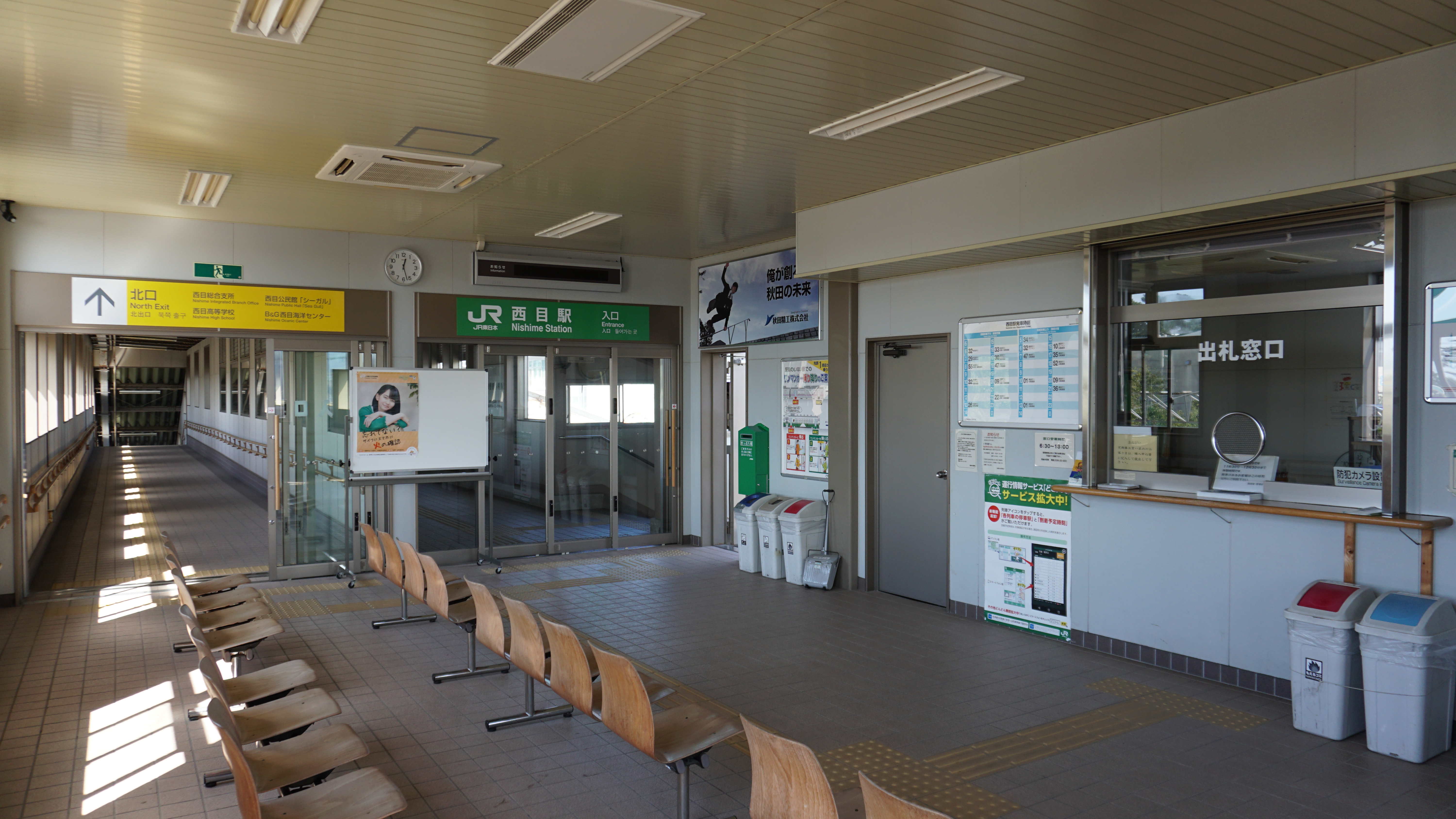 羽越本線 西目駅（秋田県由利本荘市）